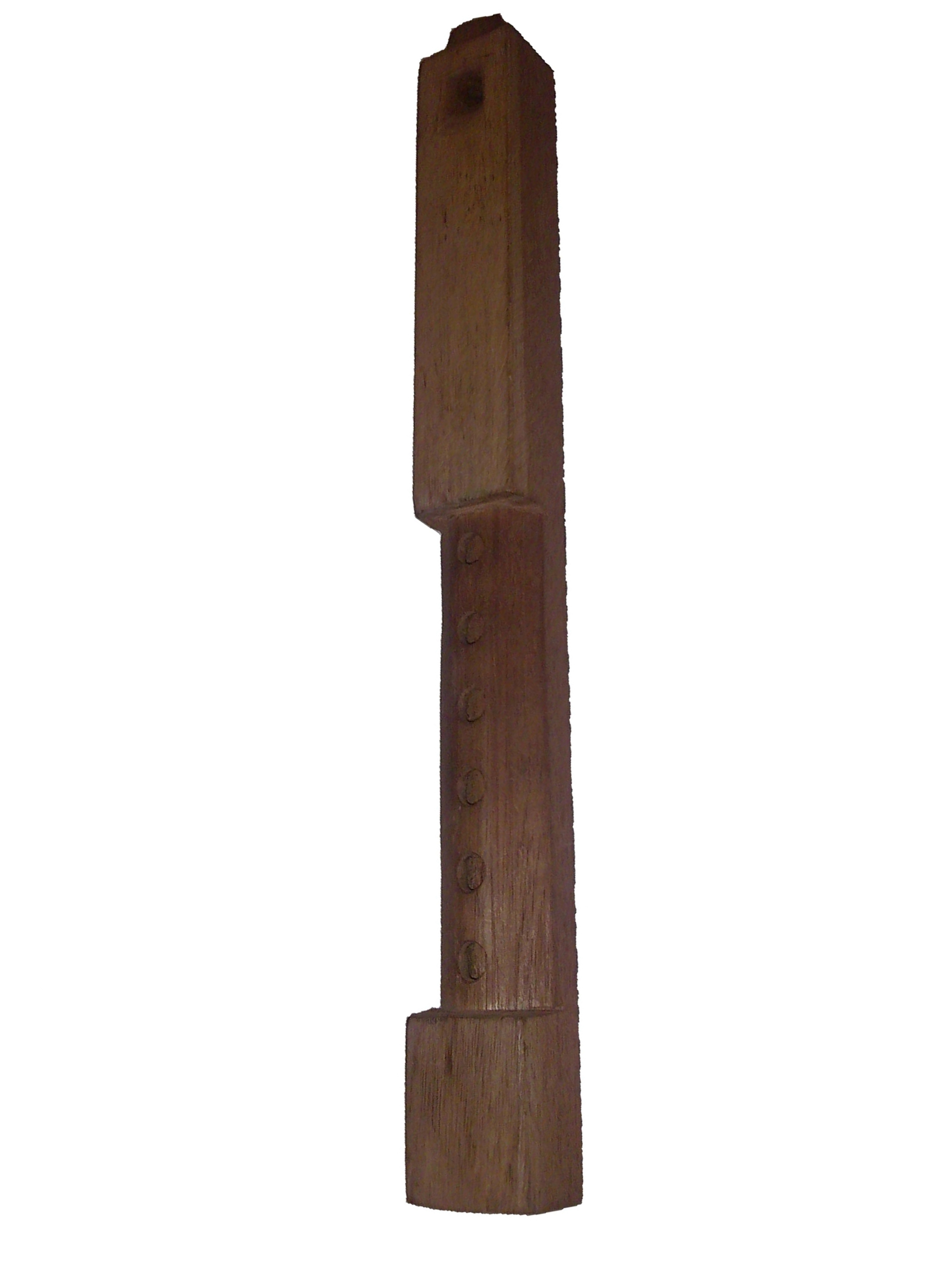 Imagen de la tarka, instrumento ancestral de los andes